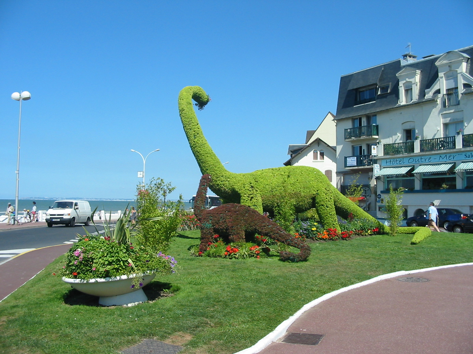 Villers-sur-mer Les dinosaures